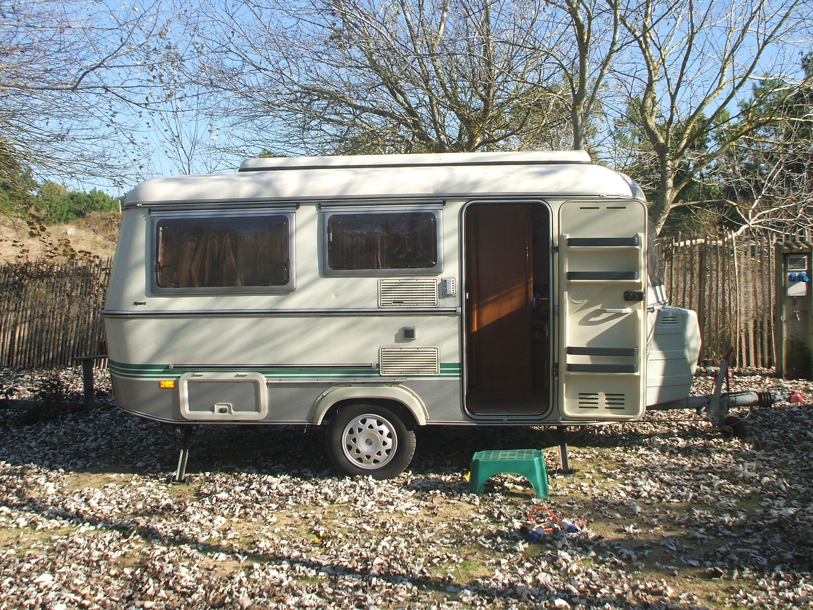 Eriba Triton de 1995 avec le toit baissé